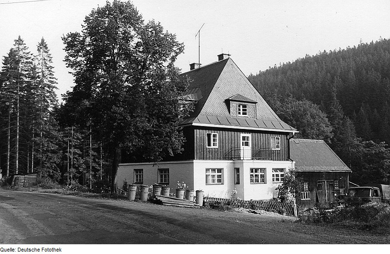 Original image description from the Deutsche FotothekHermsdorf/Erzgeb.-Seyde. Herklotzmühle auf Rehefeld zu